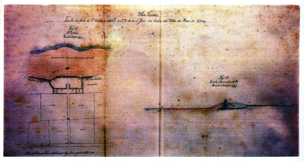 "Tombo do forte de S. Caetano...", Ilha Terceira (Açores), Portugal.